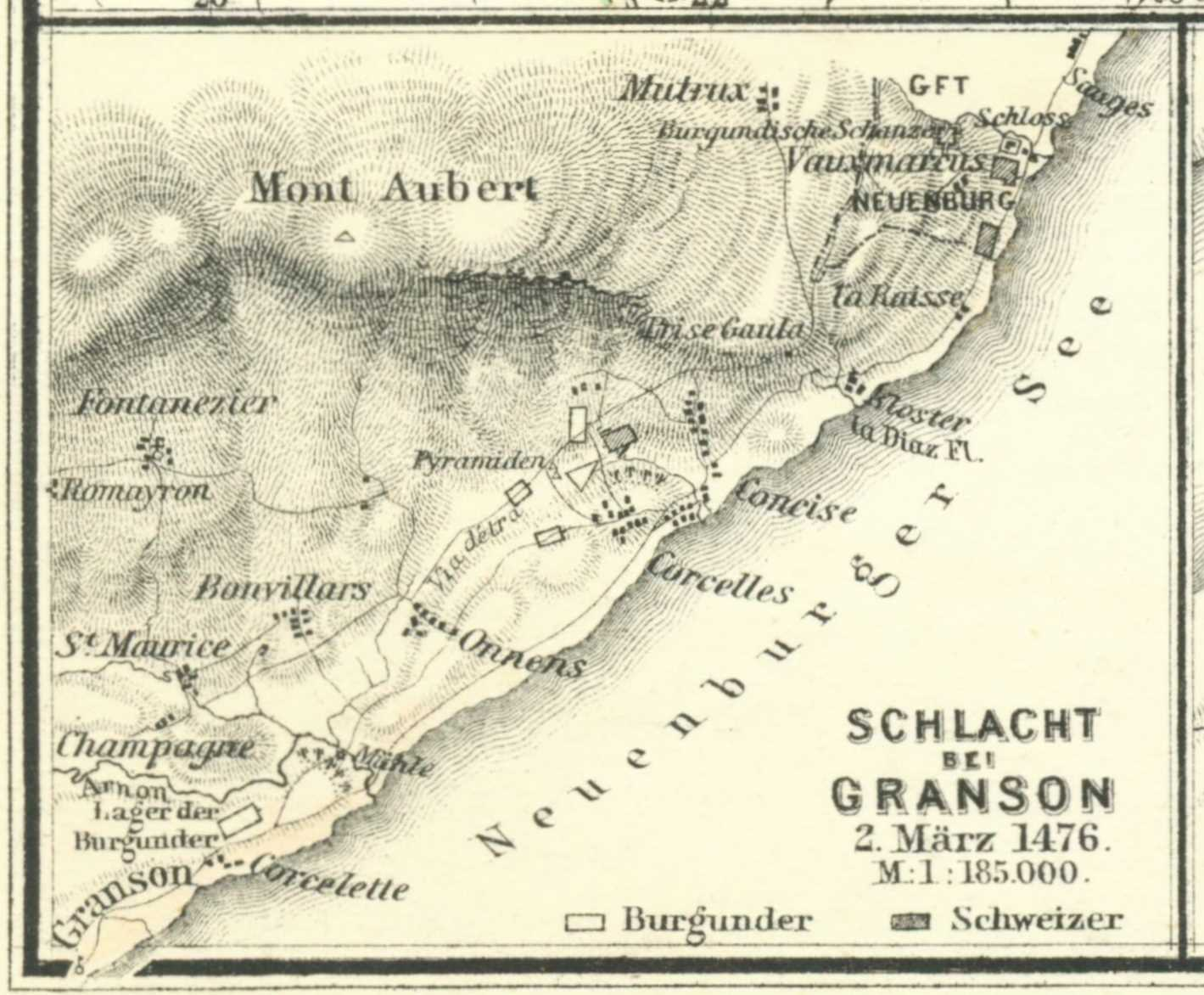 Schlacht bei Granson 2. März 1476